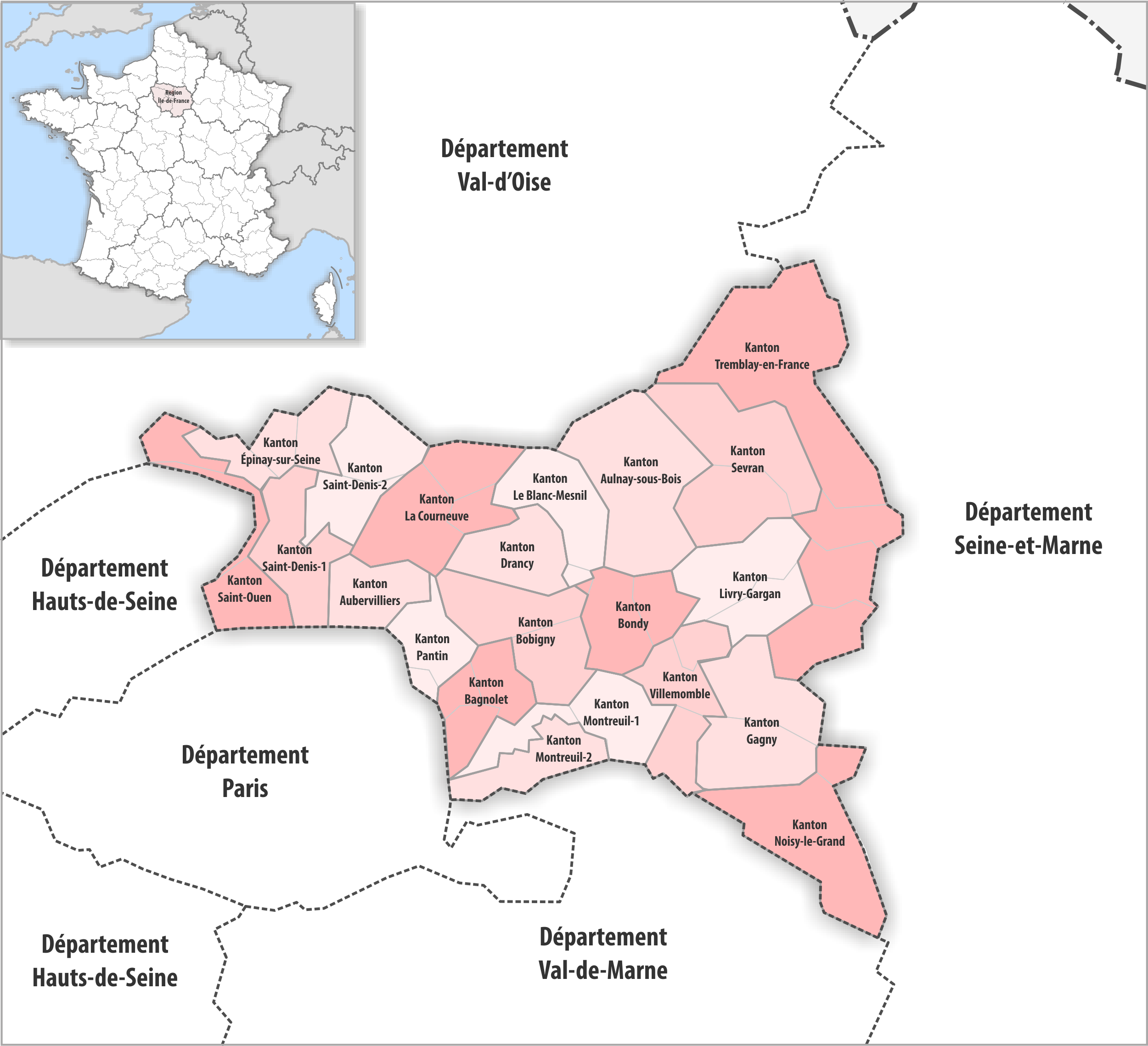 Gemeinden und Kantone im Departement Seine-Saint-Denis